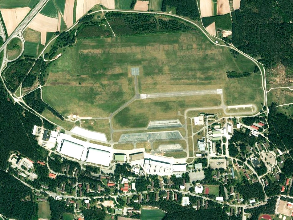 Luftaufnahme der Bayerischen Vermessungsverwaltung: Flugplatz Roth im Landkreis Roth, Bayern.